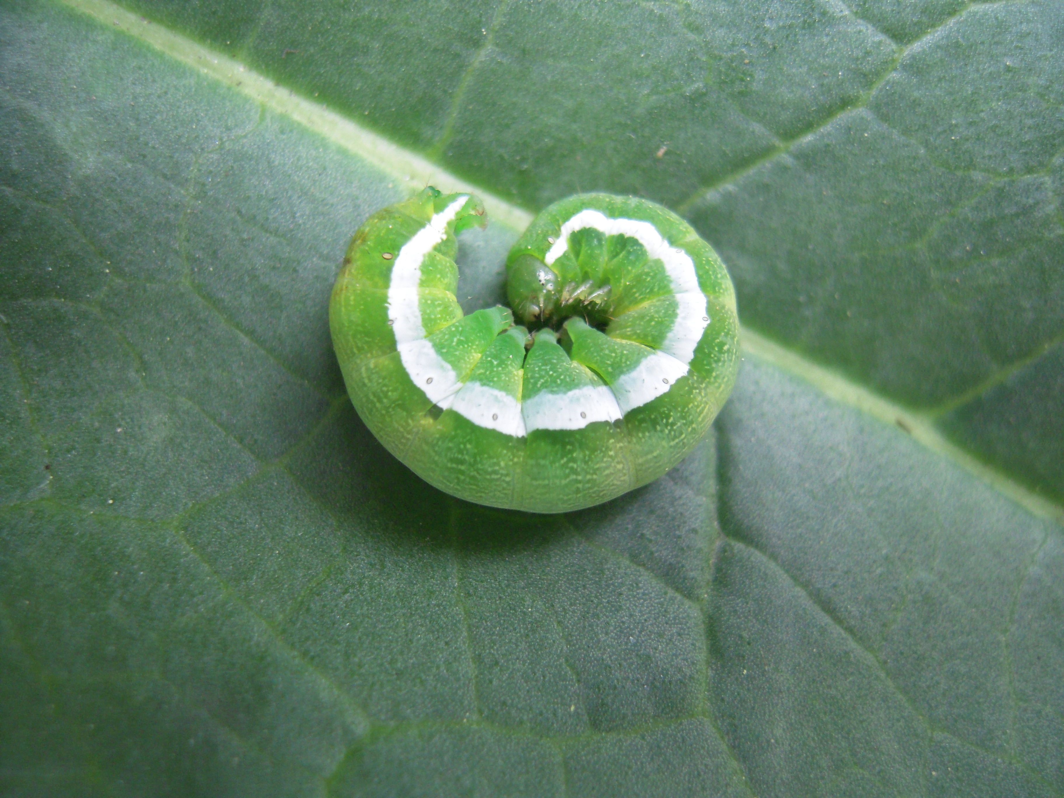 Chenille d' Orthosia gothica, Moselle, France